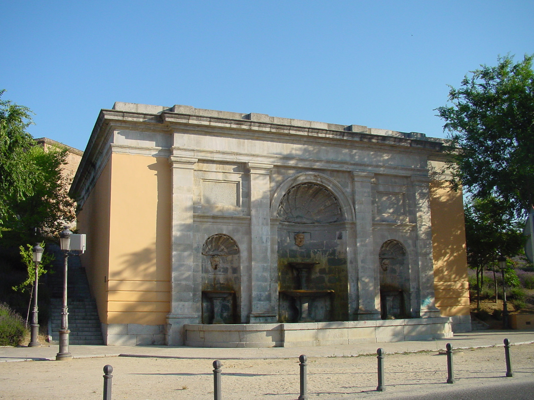 Fuente de Ventura Rodríguez (o de los Tres Caños) en Boadilla del Monte.